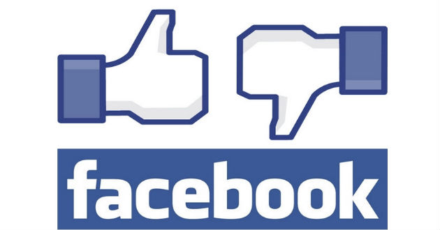 Facebook en el aula